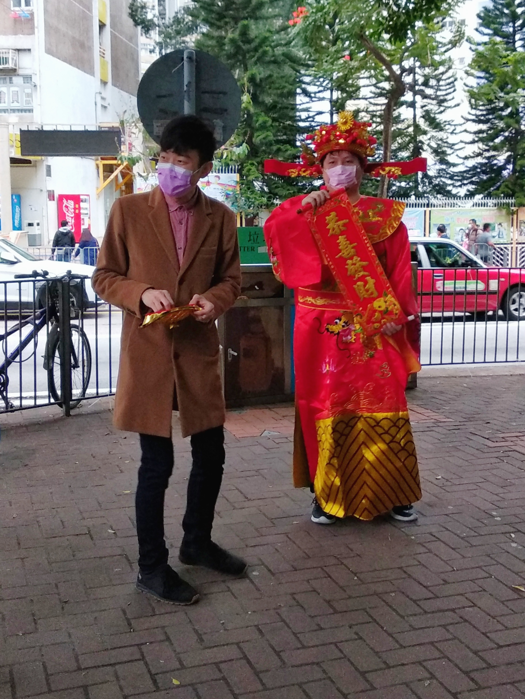 中文（香港）: 張文龍（圖左）於長安邨一帶街頭進行農曆新年賀年活動。